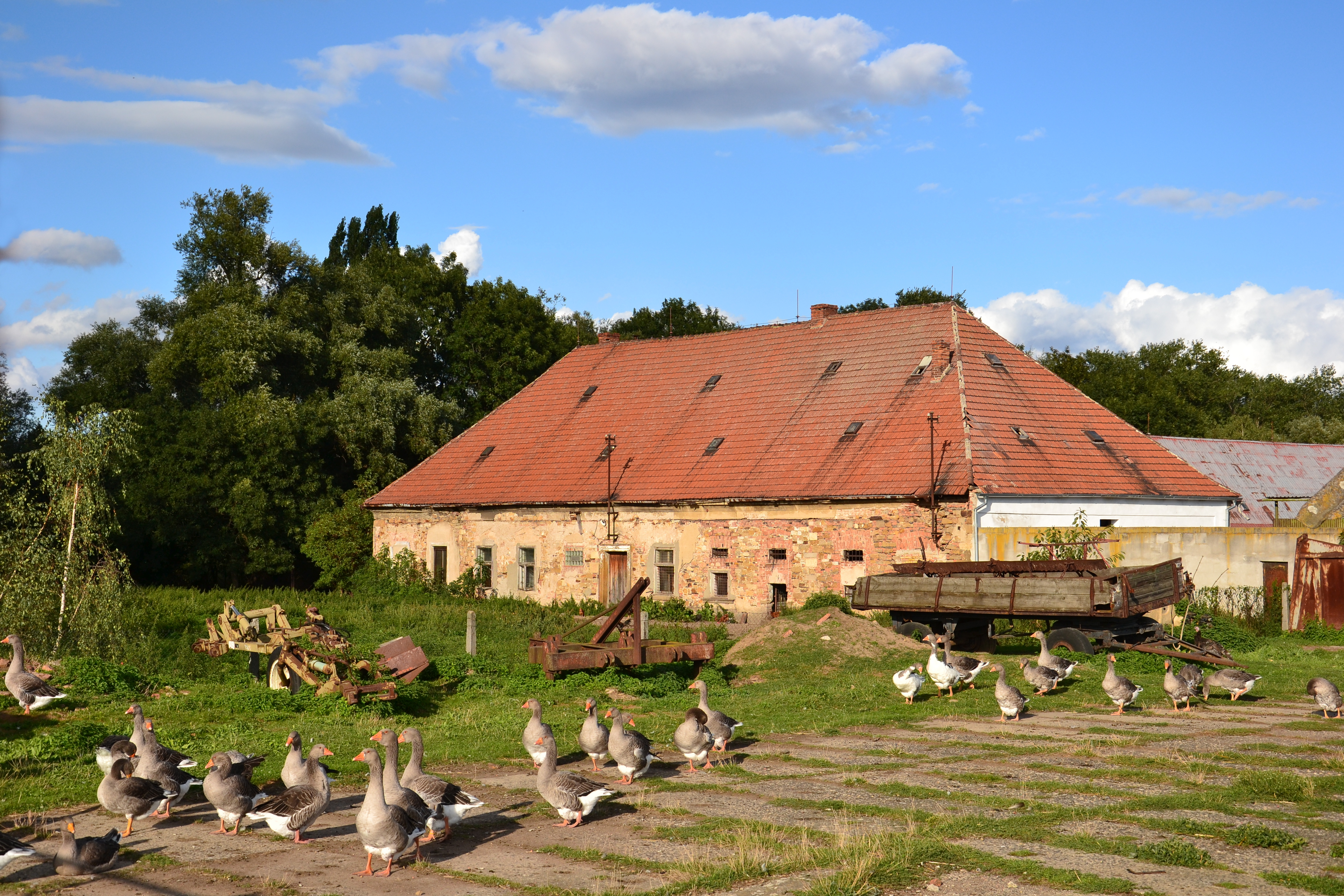 Zadní strana zámecké budovy